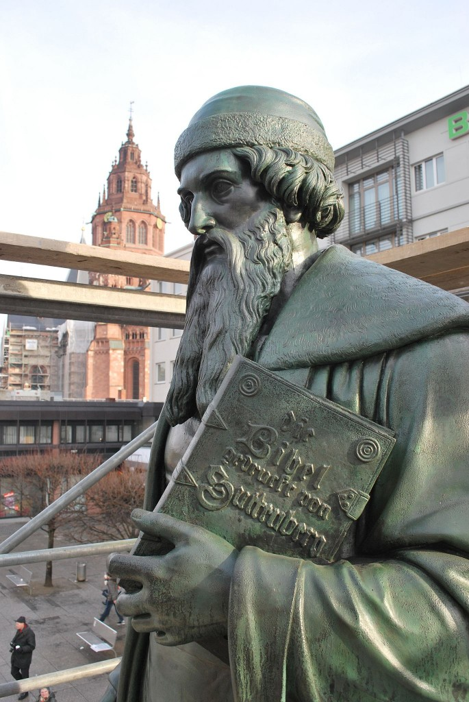 Gutenberg-Denkmal in Mainz